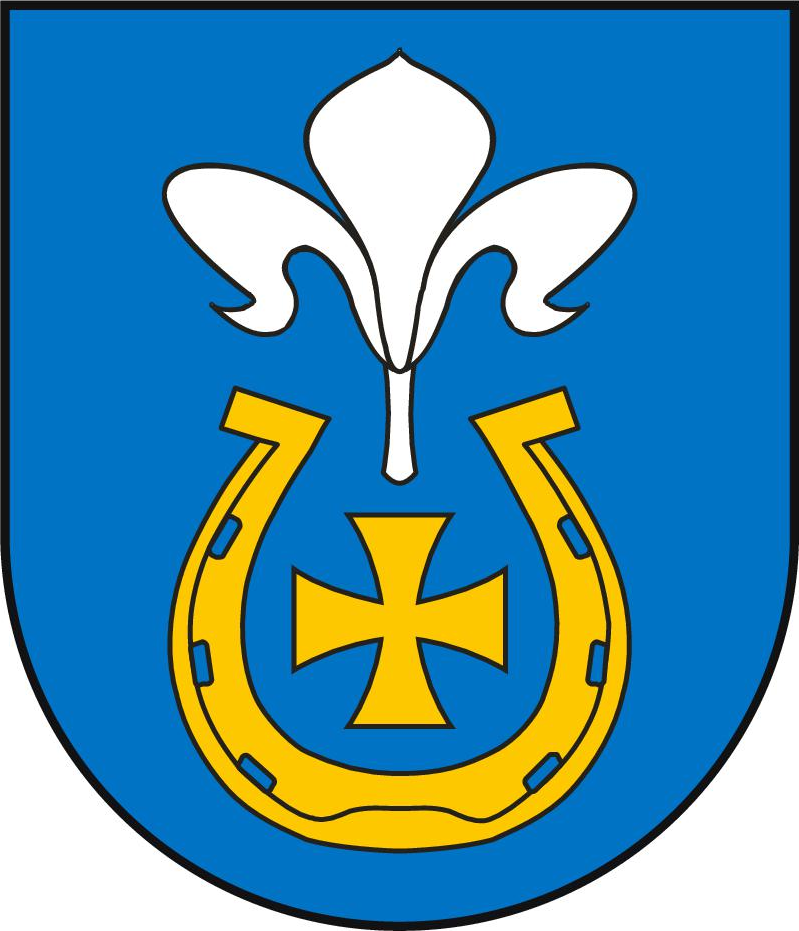 Herb gminy Sulmierzyce